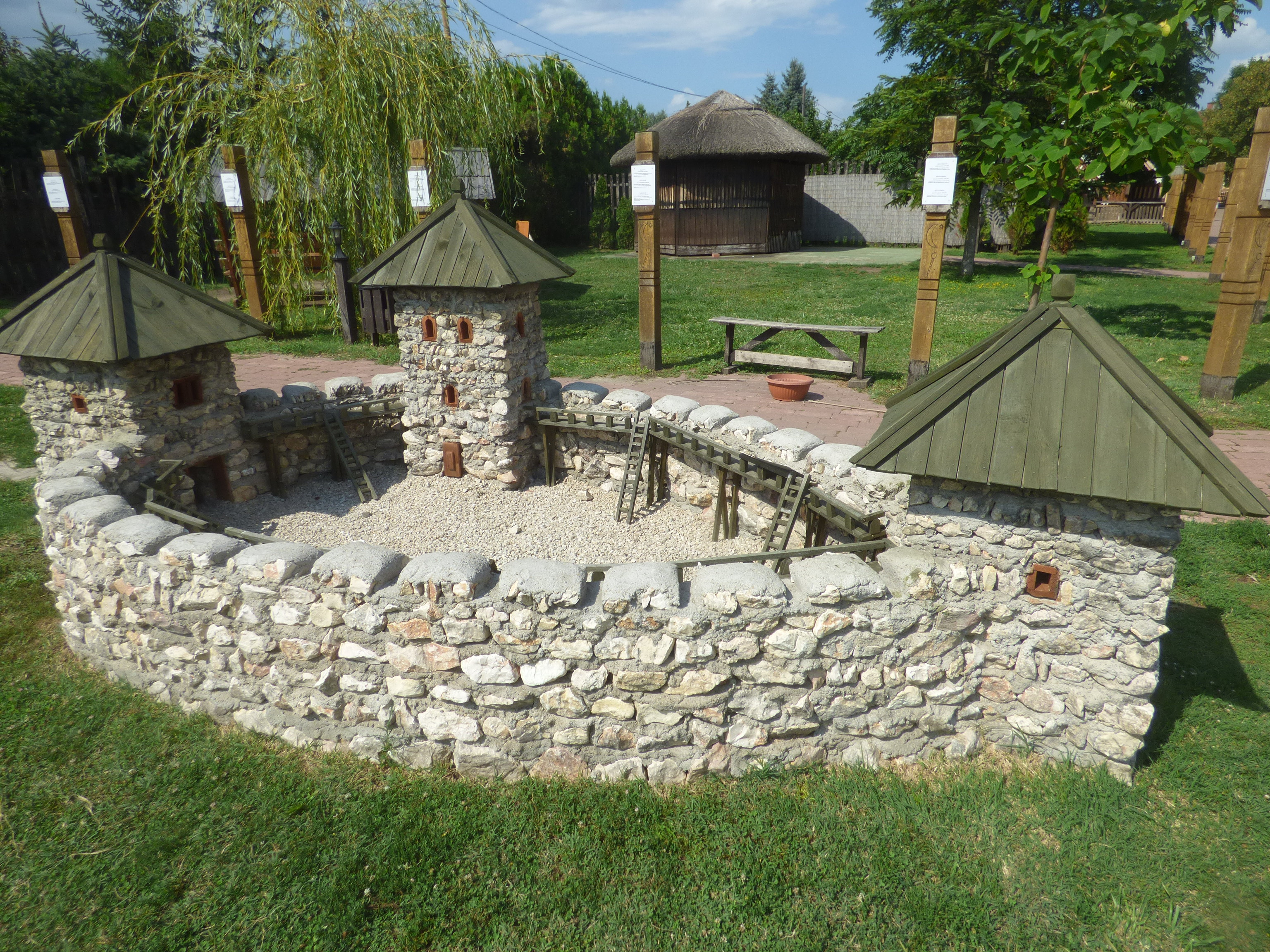 Talmács várának (Nagytalmács) makettje a dinnyési Várparkban